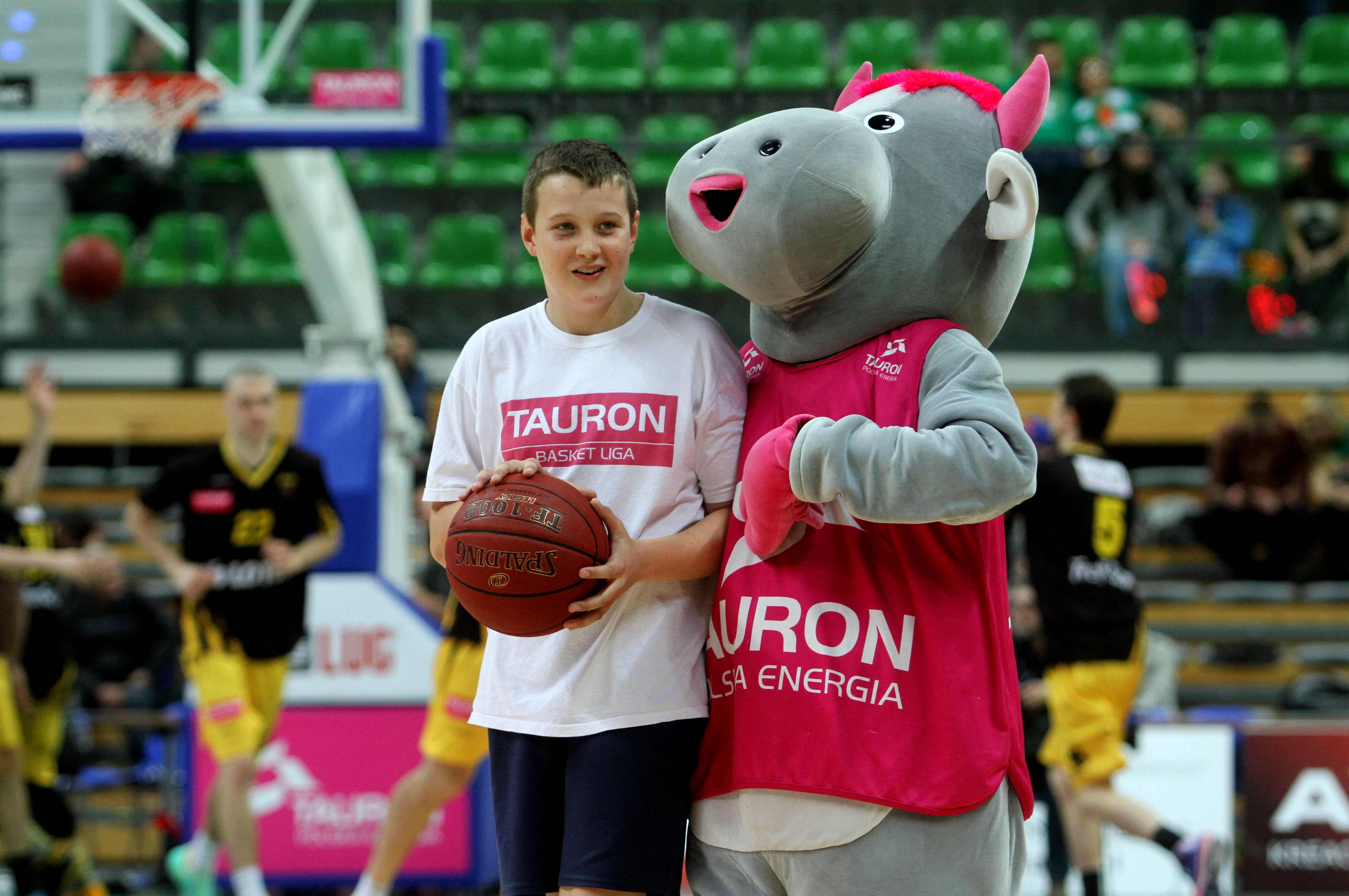 Maskotka Tauron Basket Ligi Tauronek